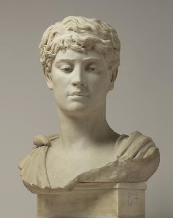 Escultura del emperador Honorio